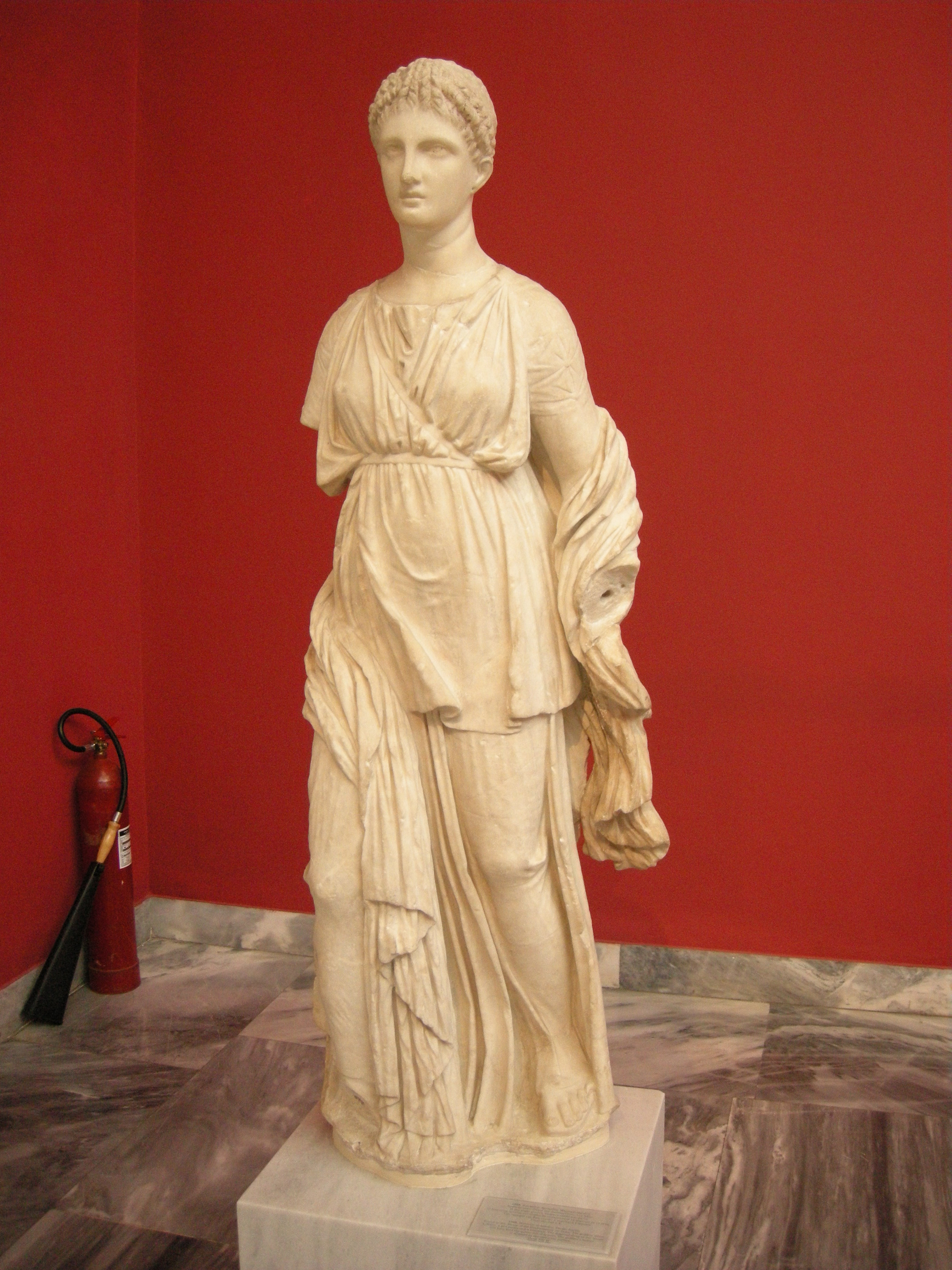 Artemis diadoumena 1st century bc